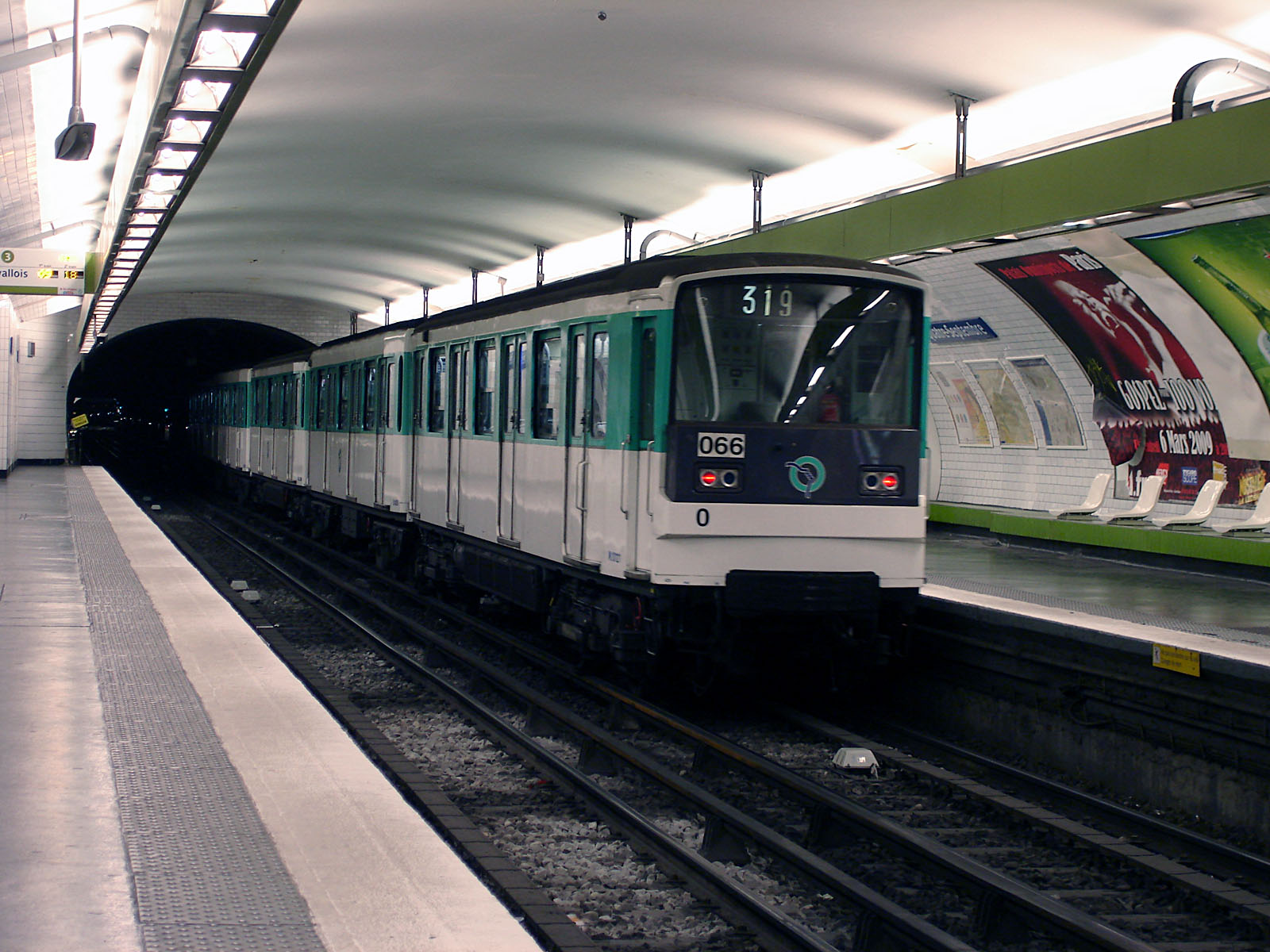 MF 67 quittant la station Quatre-Septembre de la ligne 3 du métro de Paris, France.